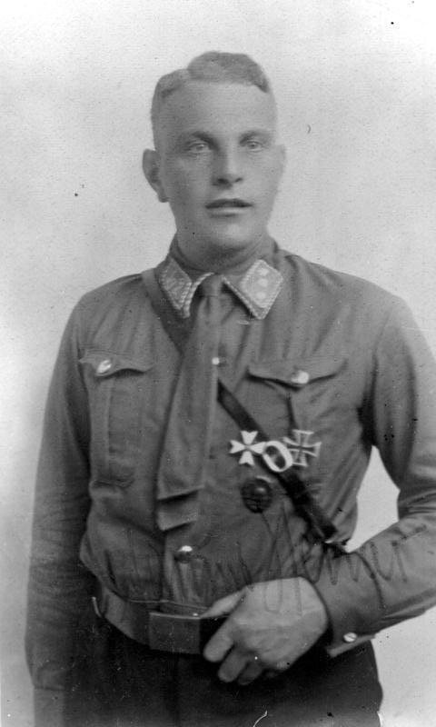 Edmund Heines Porträt von Edmund Heines [Porträt Edmund Heines in Uniform als SA-Sturmführer mit Orden] Abgebildete Personen: Heines, Edmund: SA-Obergruppenführer, Polizeipräsident von Breslau, Deutschland (GND 124349595)